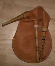 Säckpipa byggd av Leif Eriksson Foto av Olle Gällmo [1] (publicerat med tillstånd från fotografen, Olle Gällmo, och för honom är det inga problem att de blir GFDL)